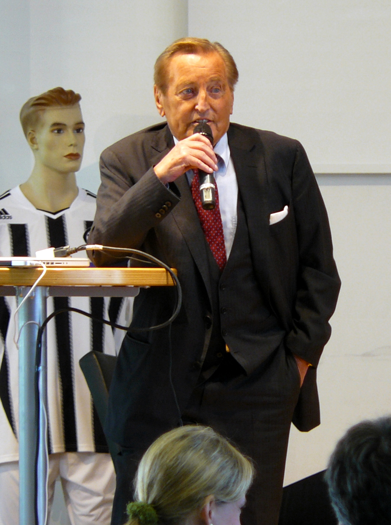 Gerhard Mayer-Vorfelder während eines Vortrags anlässlich des Sportmedizinischen Symposiums Ostwürttemberg am 8. Oktober 2011 im Imtech-Forum des VfR Aalen